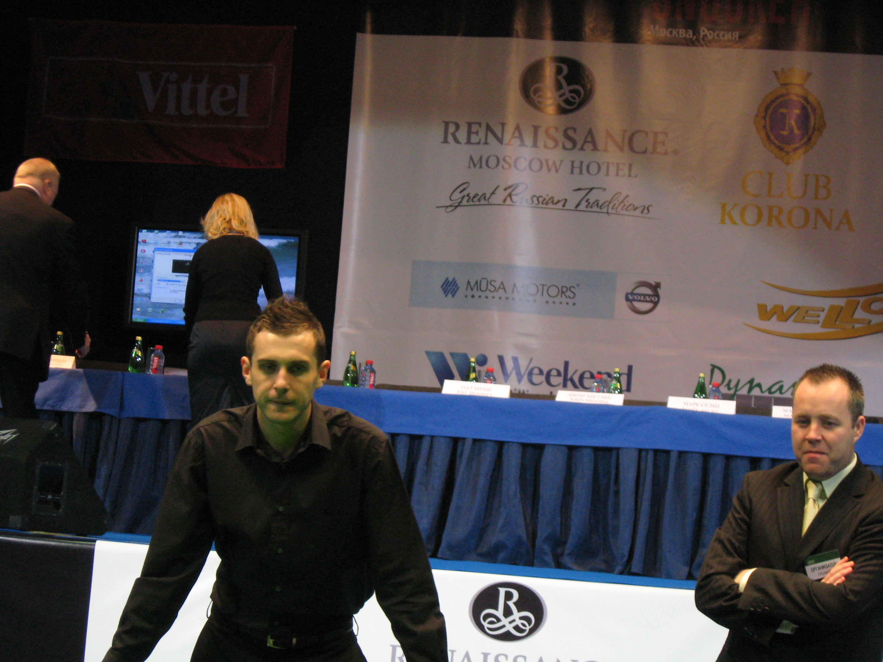 Туринир World Series of Snooker в Москве